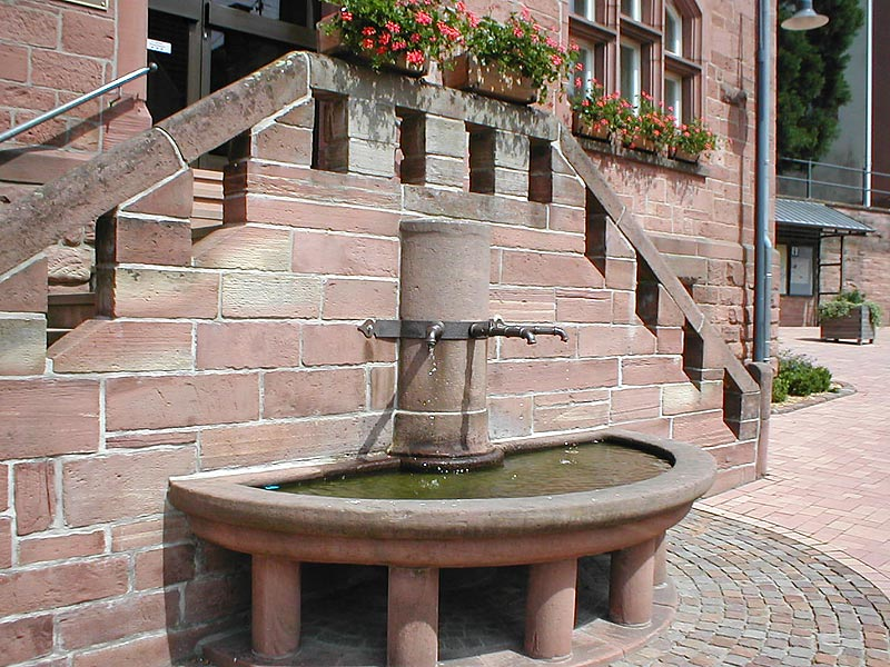 Brunnen am Rathaus in Neunkirchen (Odenwald)